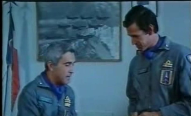 Mico Cundari e Riccardo Salvino - Screenschot du film Forza "g" de 1972 de Duccio Tessari.